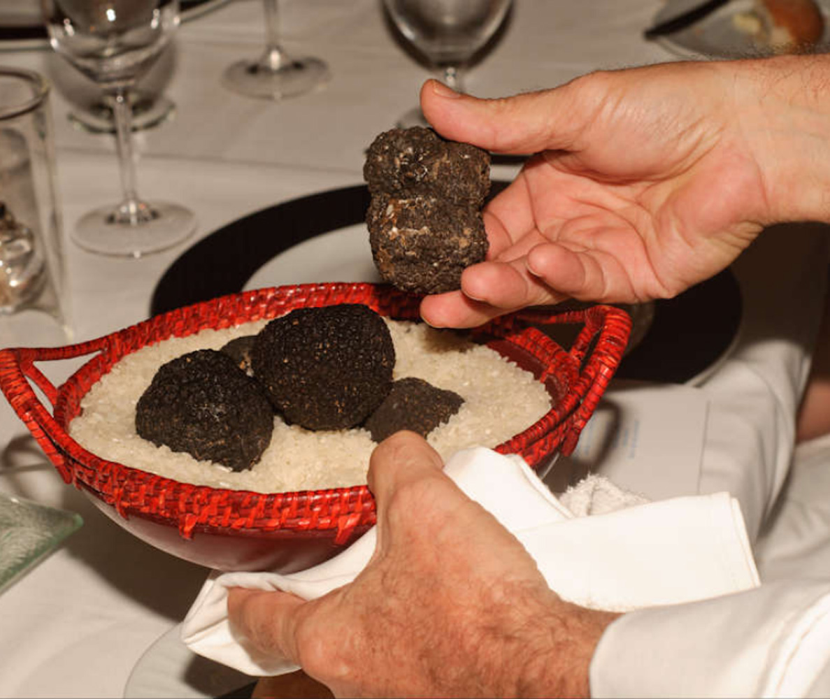 Truffes noires prêtes à être cuisinées